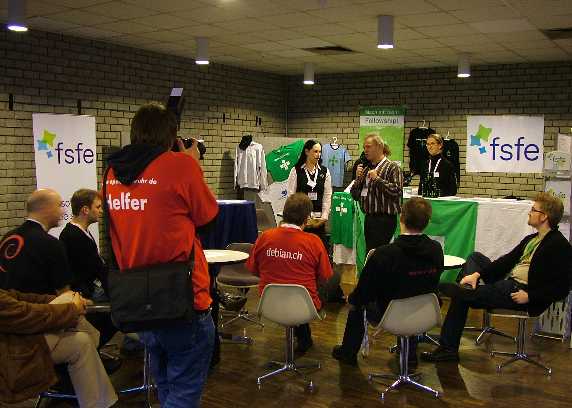 Bottrop, Saalbau: OpenRheinRuhr. Interview beim Stand der Free Software Foundation Europe.